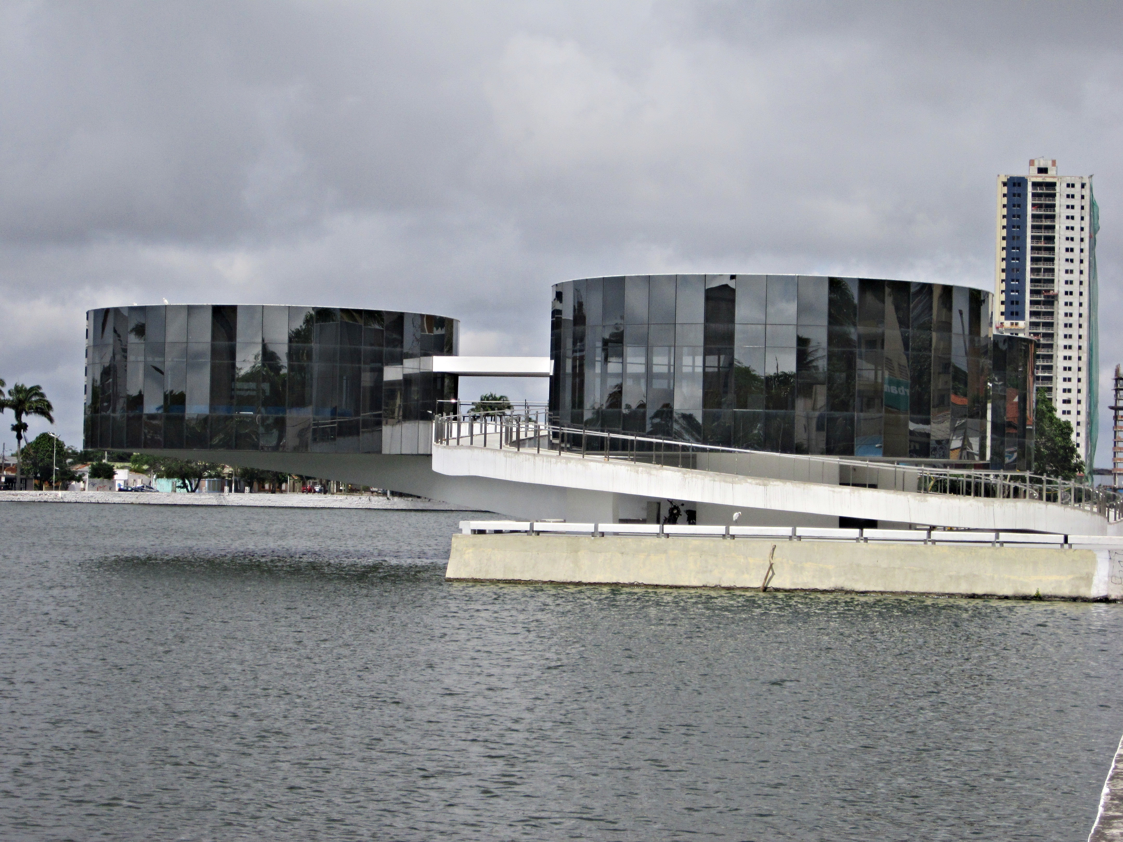 Museu de Arte Popular da Paraíba - Campina Grande, Paraíba, Brasil